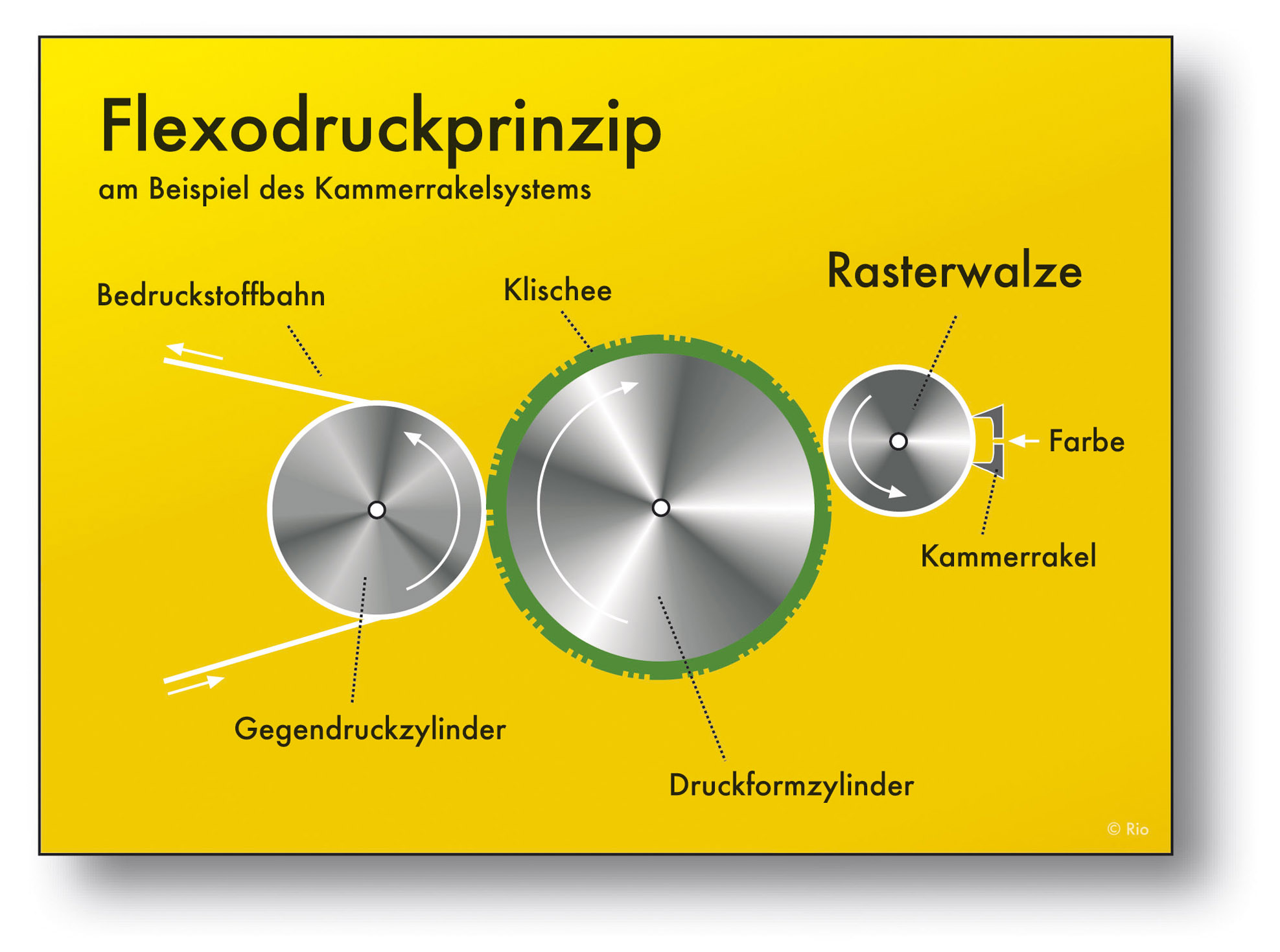 Grafisch vereinfachte Darstellung des Flexodruckprinzips am Beispiel des Kammerrakelsystems